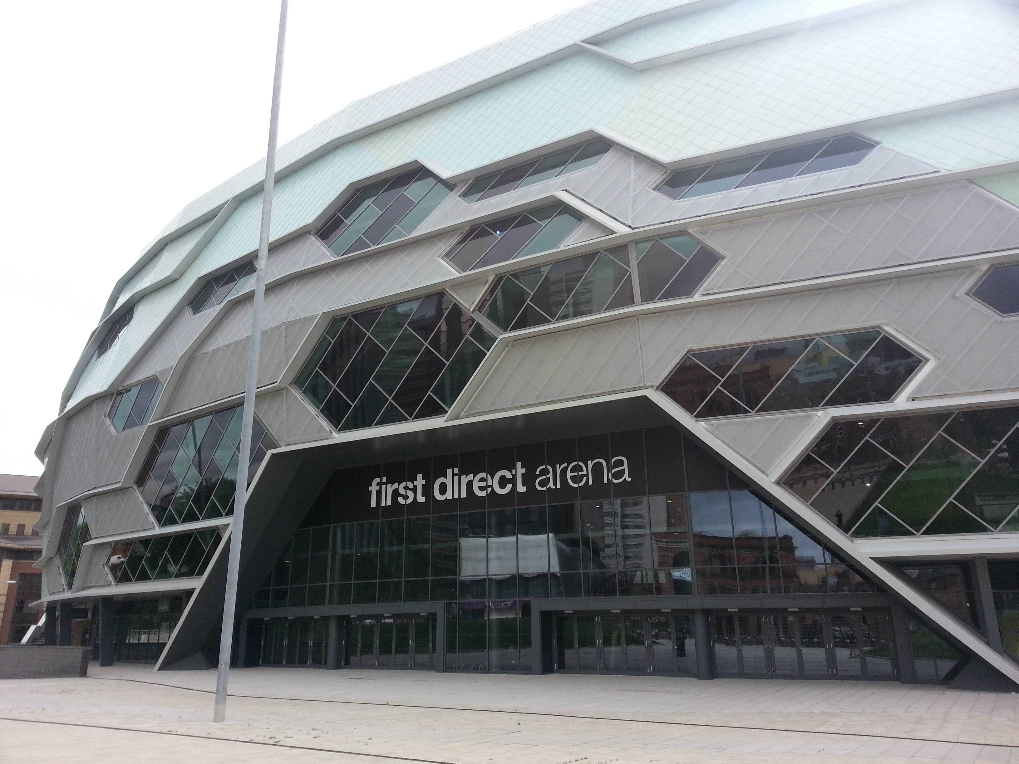 Leeds arena built in 2012